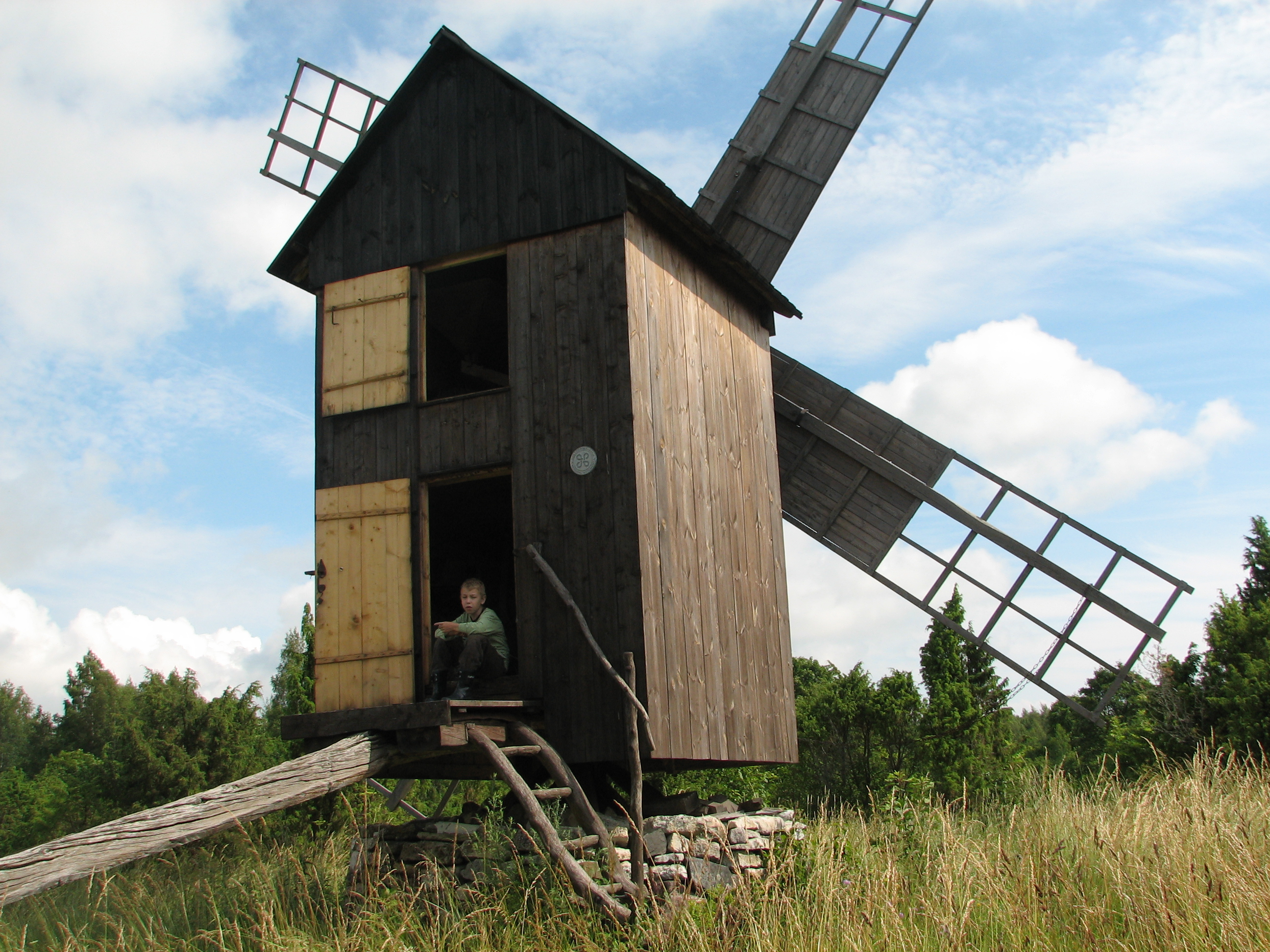 Viltina Villemi talu pukktuulik